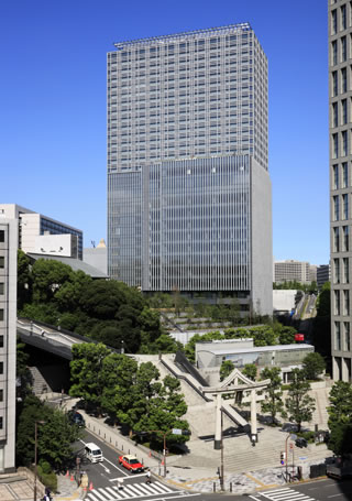 東急キャピタルタワー